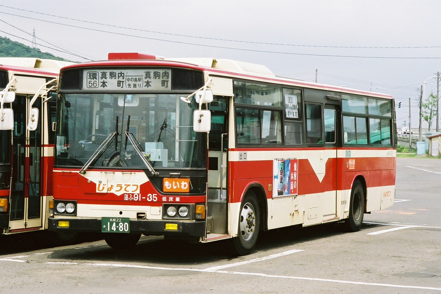 市バス式幕車